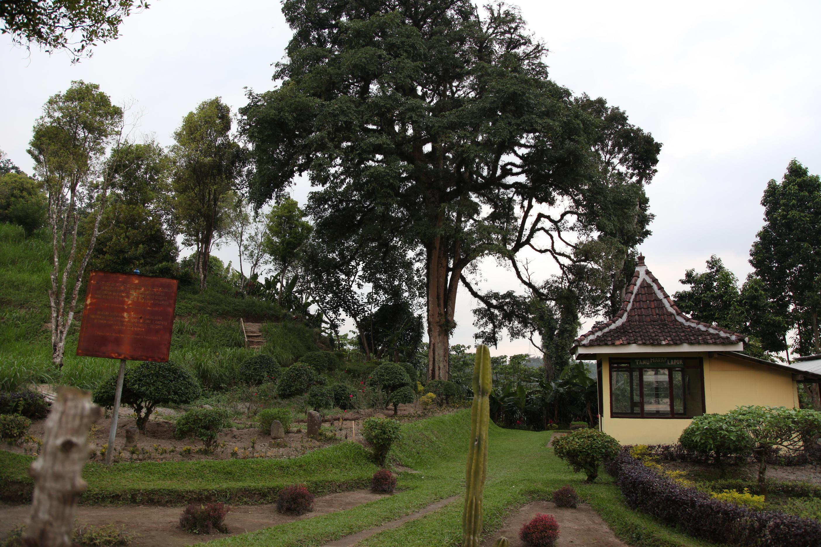 Candi Gambar Wetan (Gambar Wetan Temple)